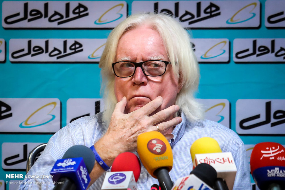 نشست خبری و وینفرد شفر سرمربی تیم فوتبال استقلال تهران بعدازظهر روز چهارشنبه با حضور خبرنگاران رسانه ها